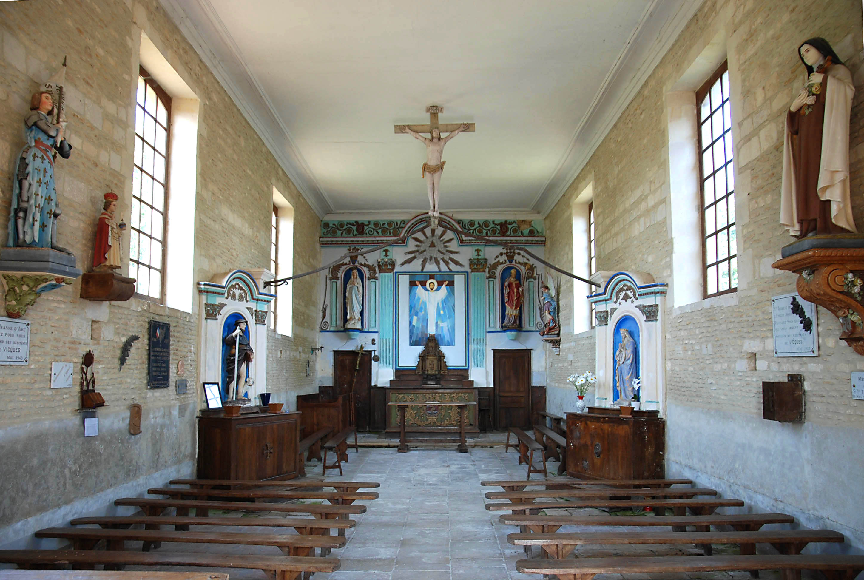 Vicques (Calvados)